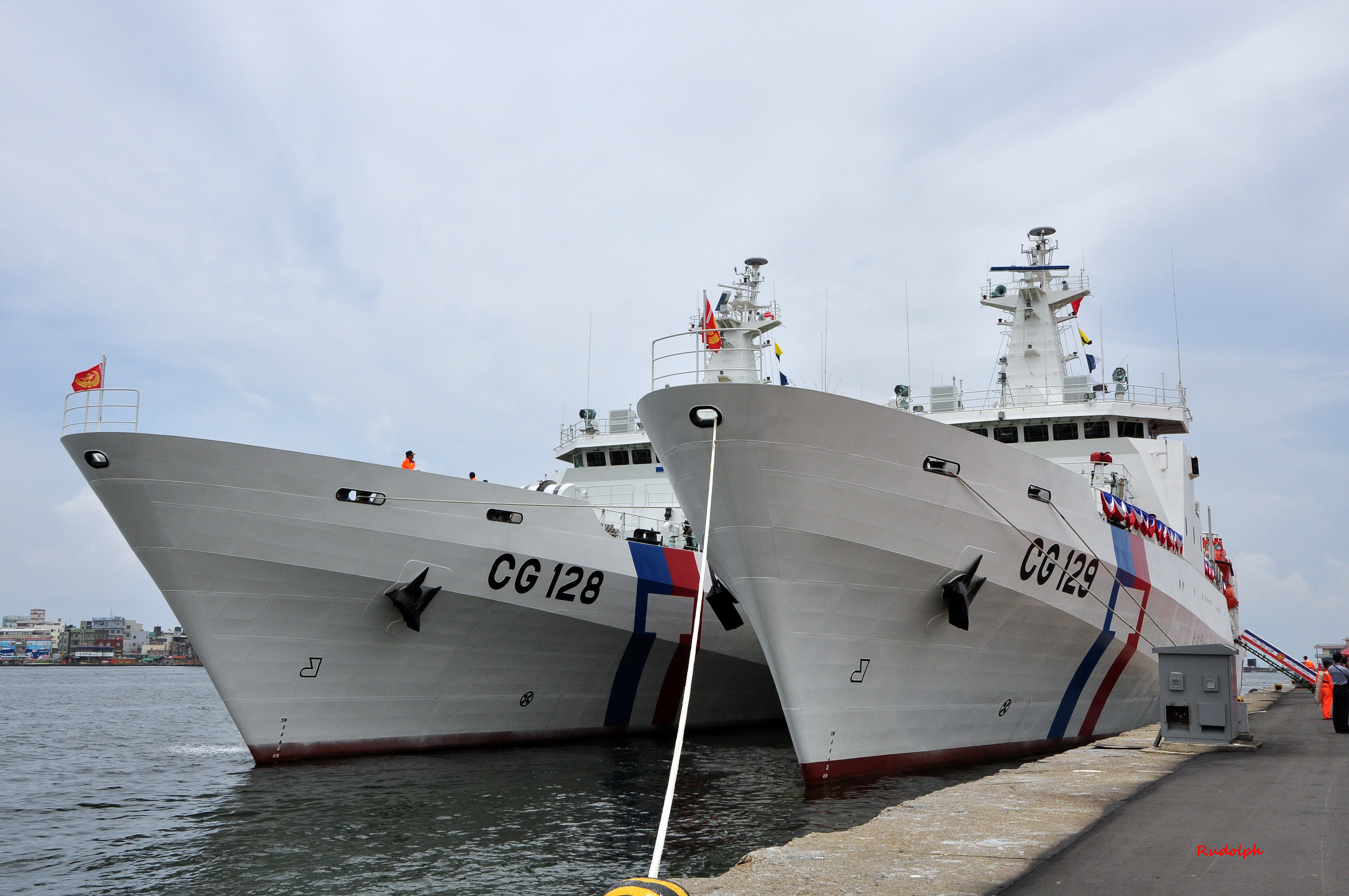 2015年6月6日成軍典禮時的宜蘭艦（左）與高雄艦（右）